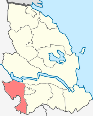 Красноозёрное сельское поселение